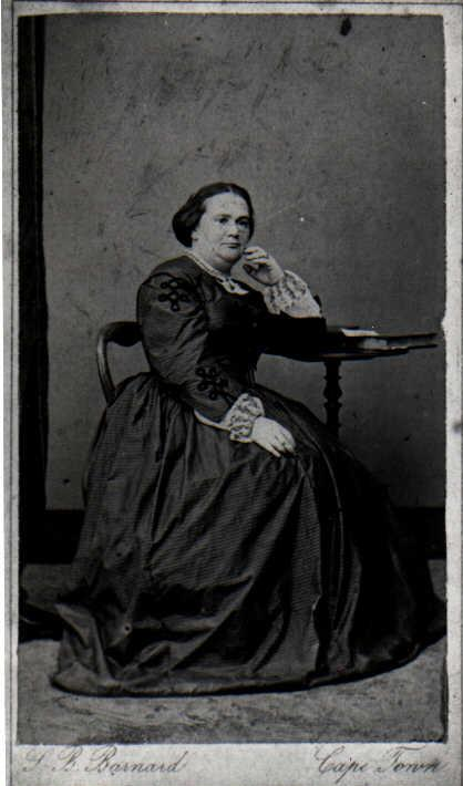 Louise Juta geb. Marx Foto Cape Town 1863